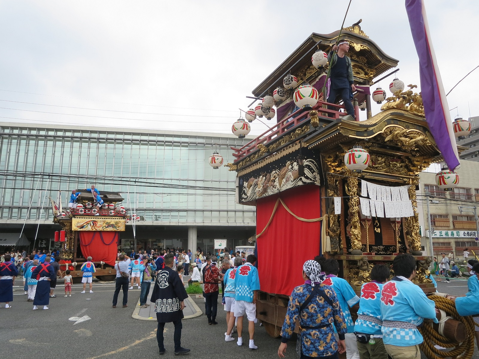 矢作神社秋の大祭（岡崎市西部地域交流センター・やはぎかんの前）